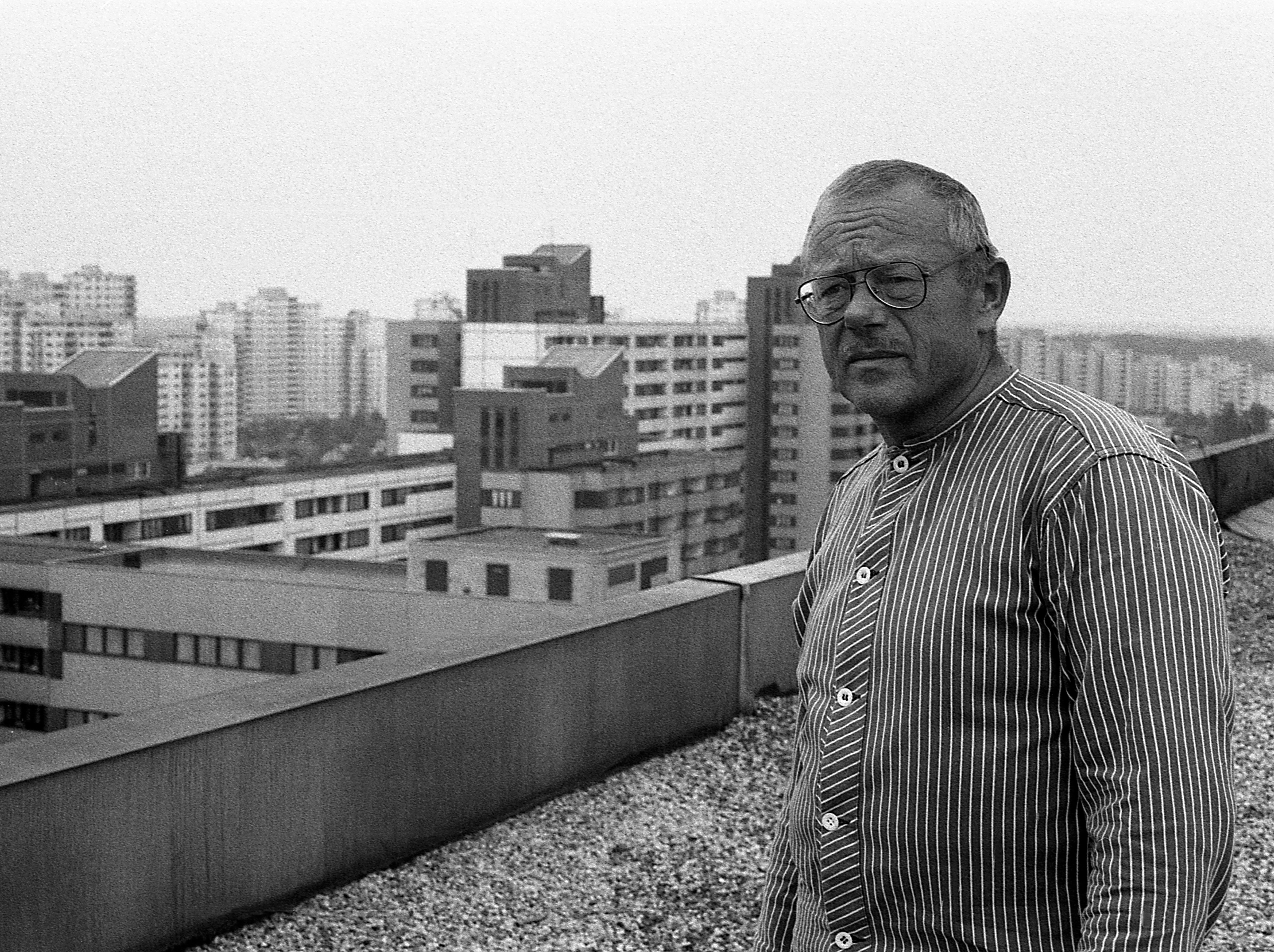 Maler